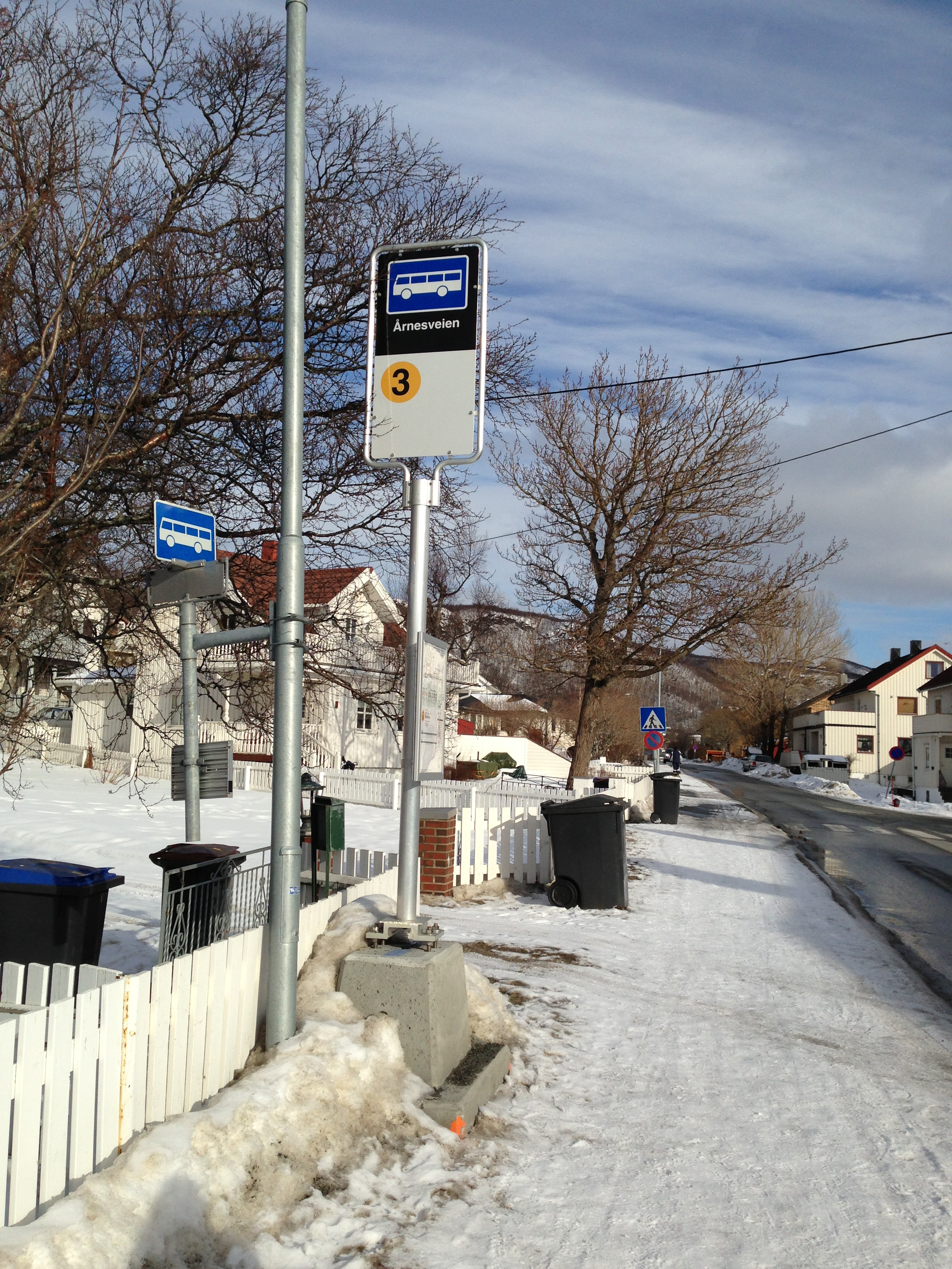 Bussholdeplassen i Årnesveien (som egentlig ligger i Fjellveien), i Bodø, Rønvik bydel.